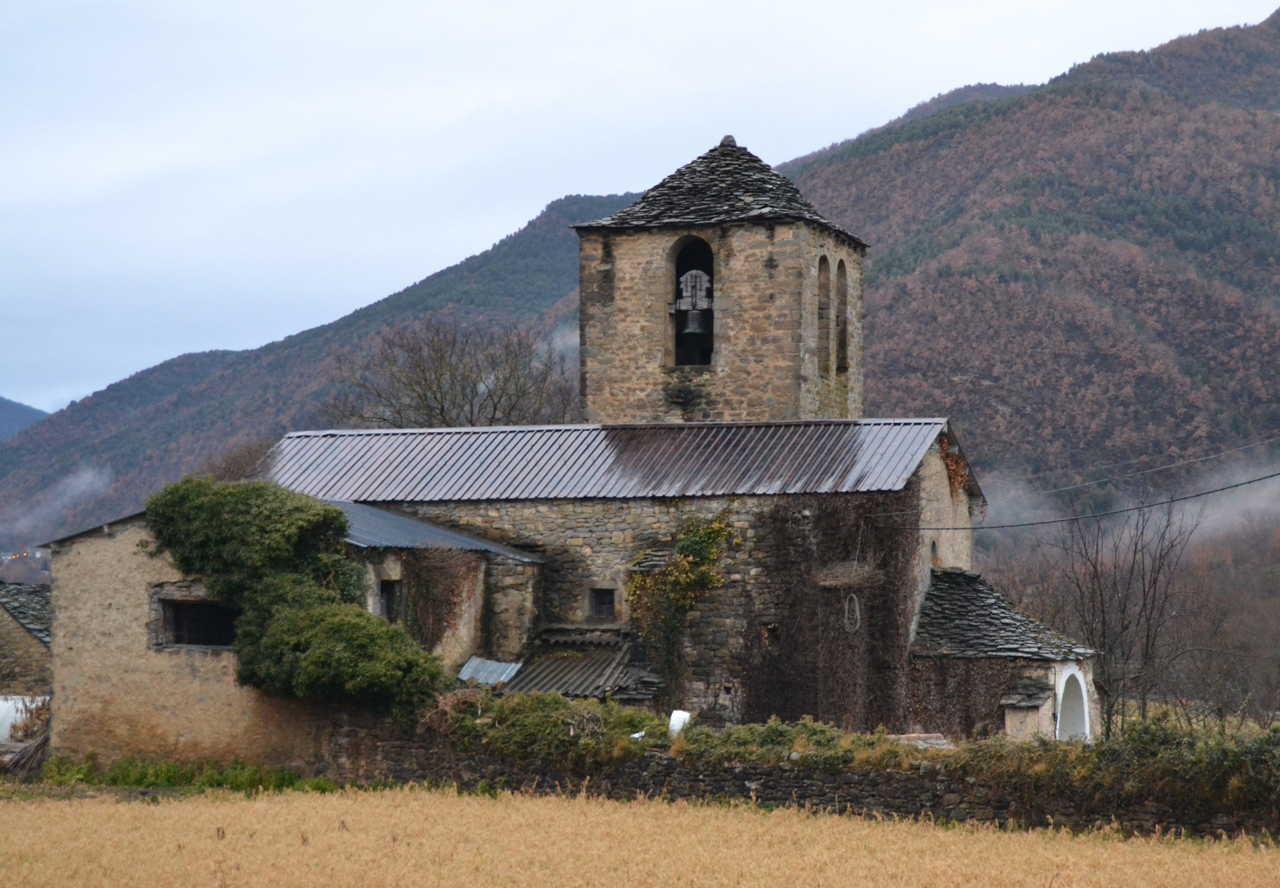 Vista lateral de l'església de l'Assumpció de Ligüerre d'Ara.